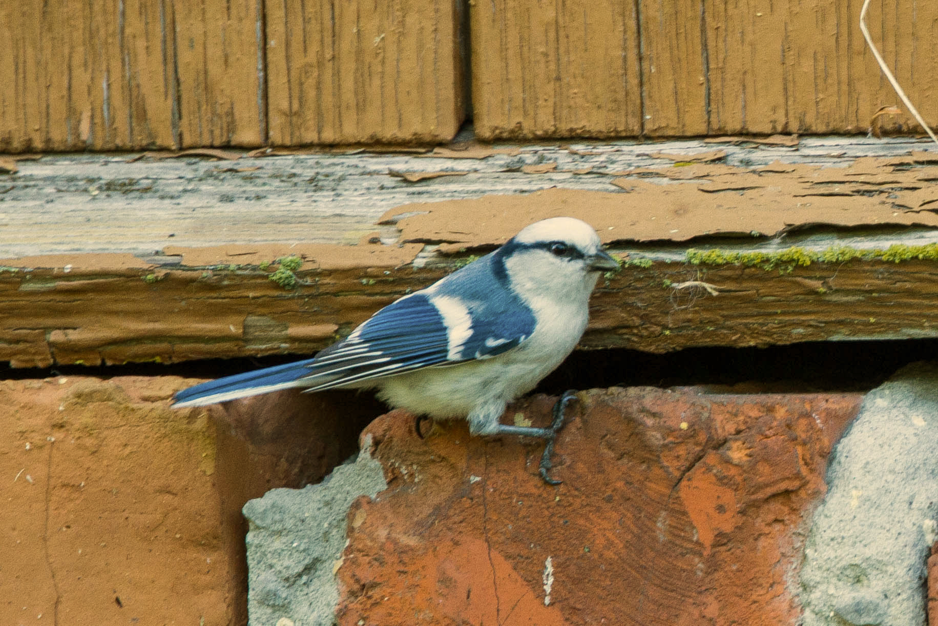 Azure Tit (Cyanistes cyanus)